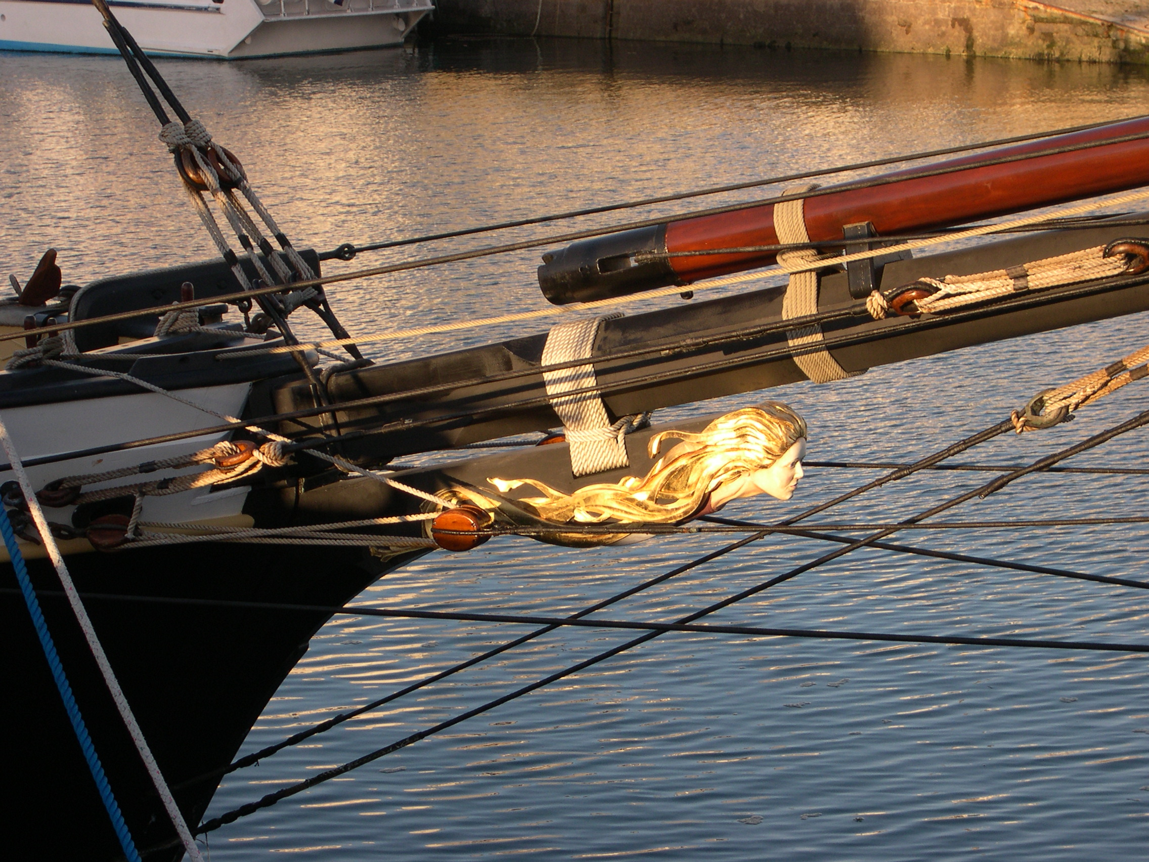 Figure de proue de la Recouvrance